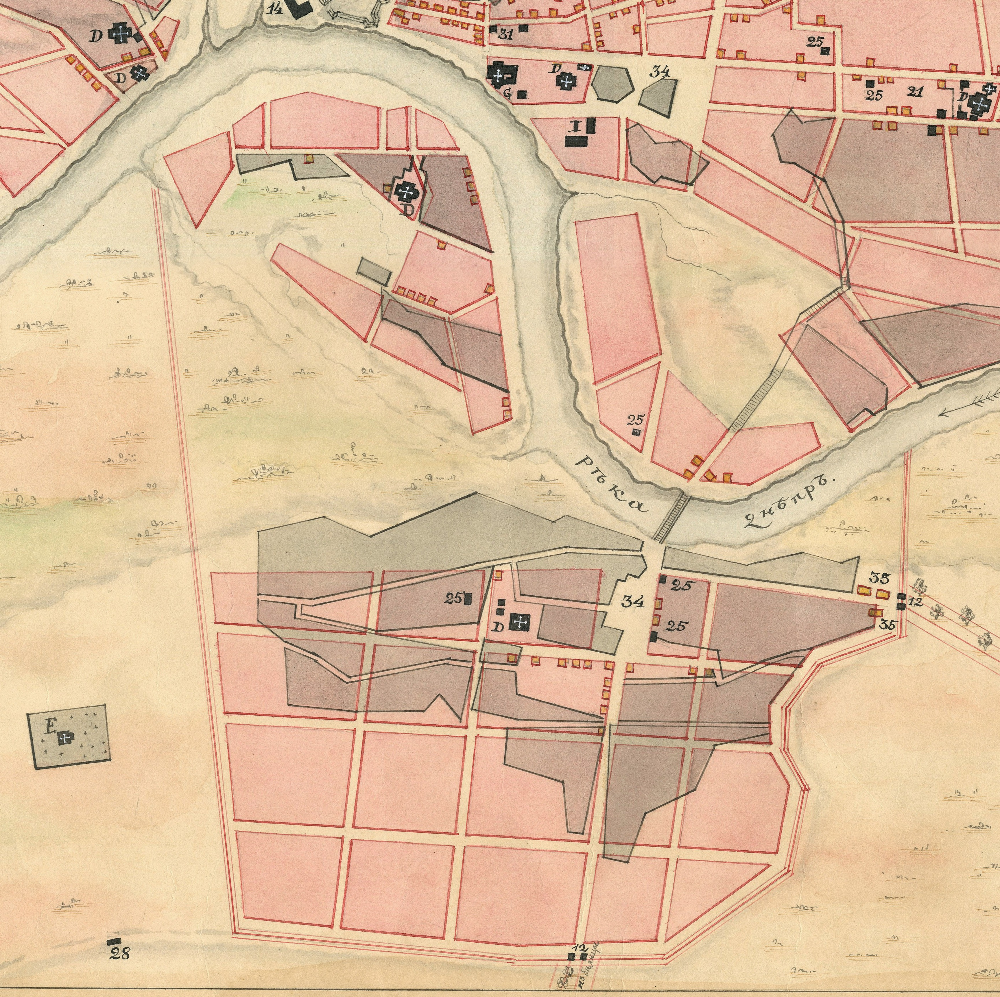 Беларуская (тарашкевіца): Магілёў (Магілёў). Плян места